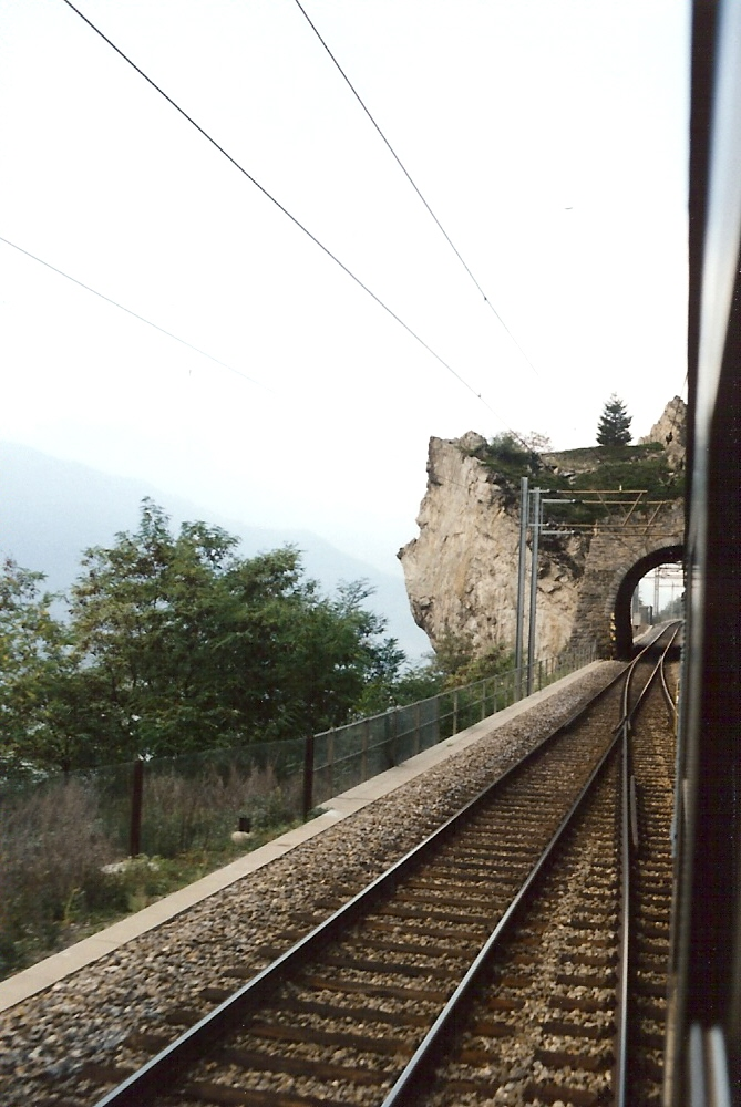 Viktoriakopftunnel auf der Lötschbergsüdrampe